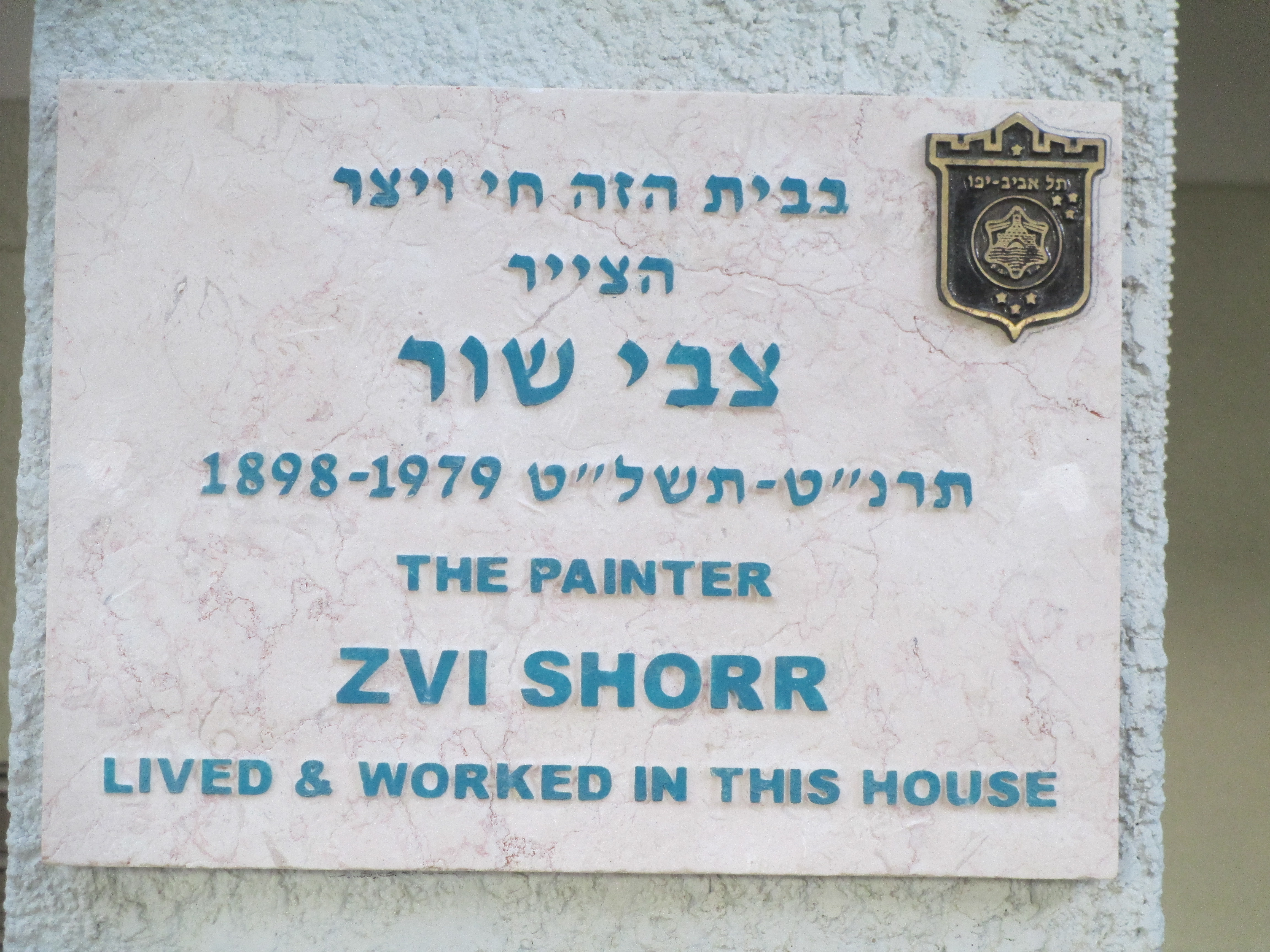 לוחית זיכרון לצייר צבי שור ברחוב גזר 4 בתל אביב